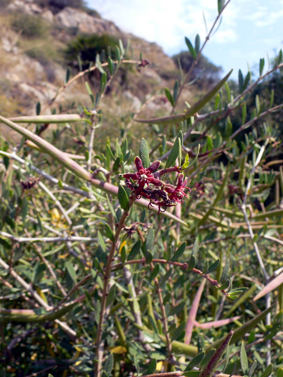 Periploca angustifolia en flor en El Portús. Parque Natural de la Sierra de la Muela (Cartagena)